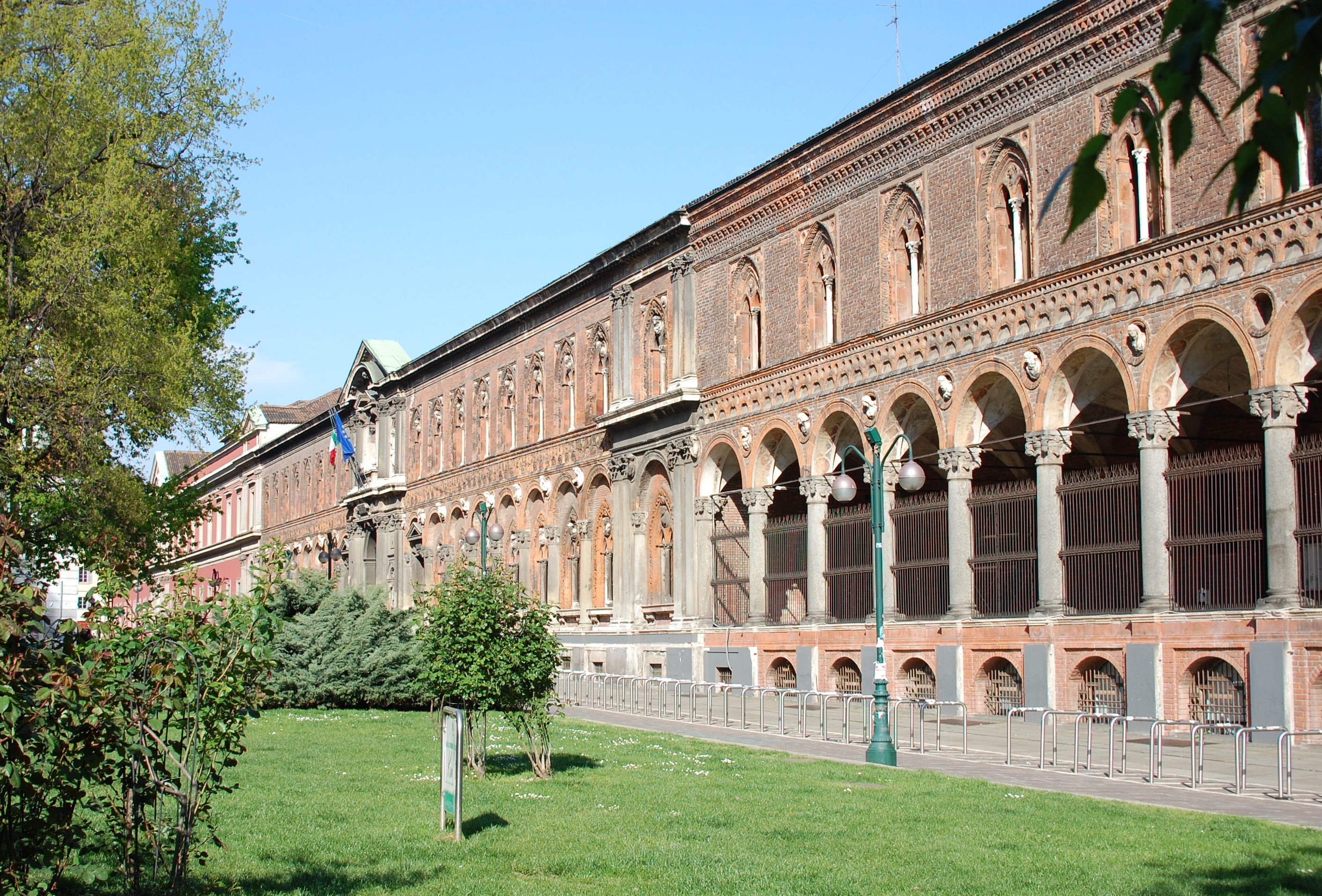 Facciata della sede dell'Università Statale di Milano in via Festa del Perdono, vista dal giardino di largo Richini.